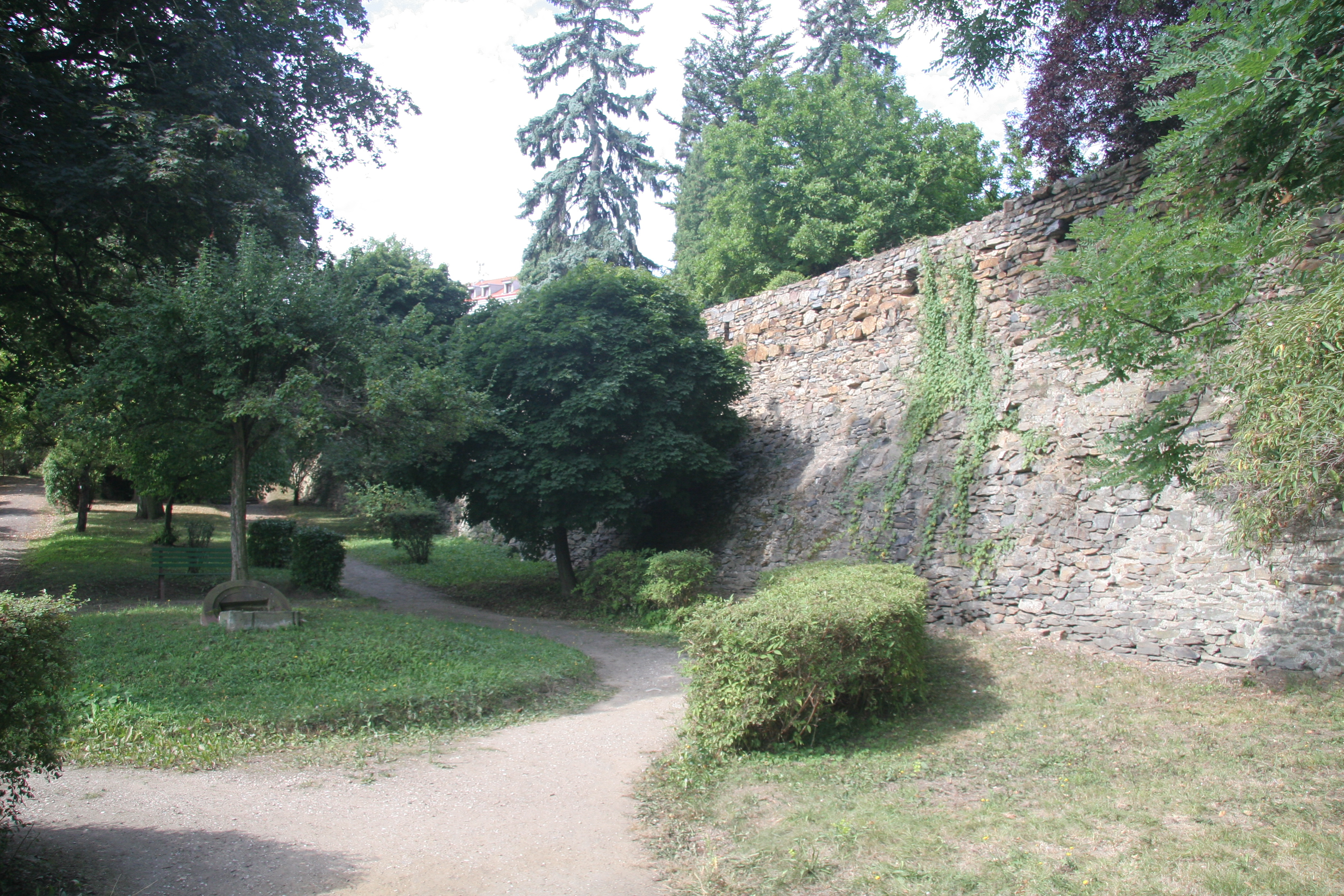 Městské opevnění (Kouřim), Kouřim